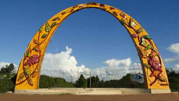 Arco construido en el 2008 en honor ala naturaleza